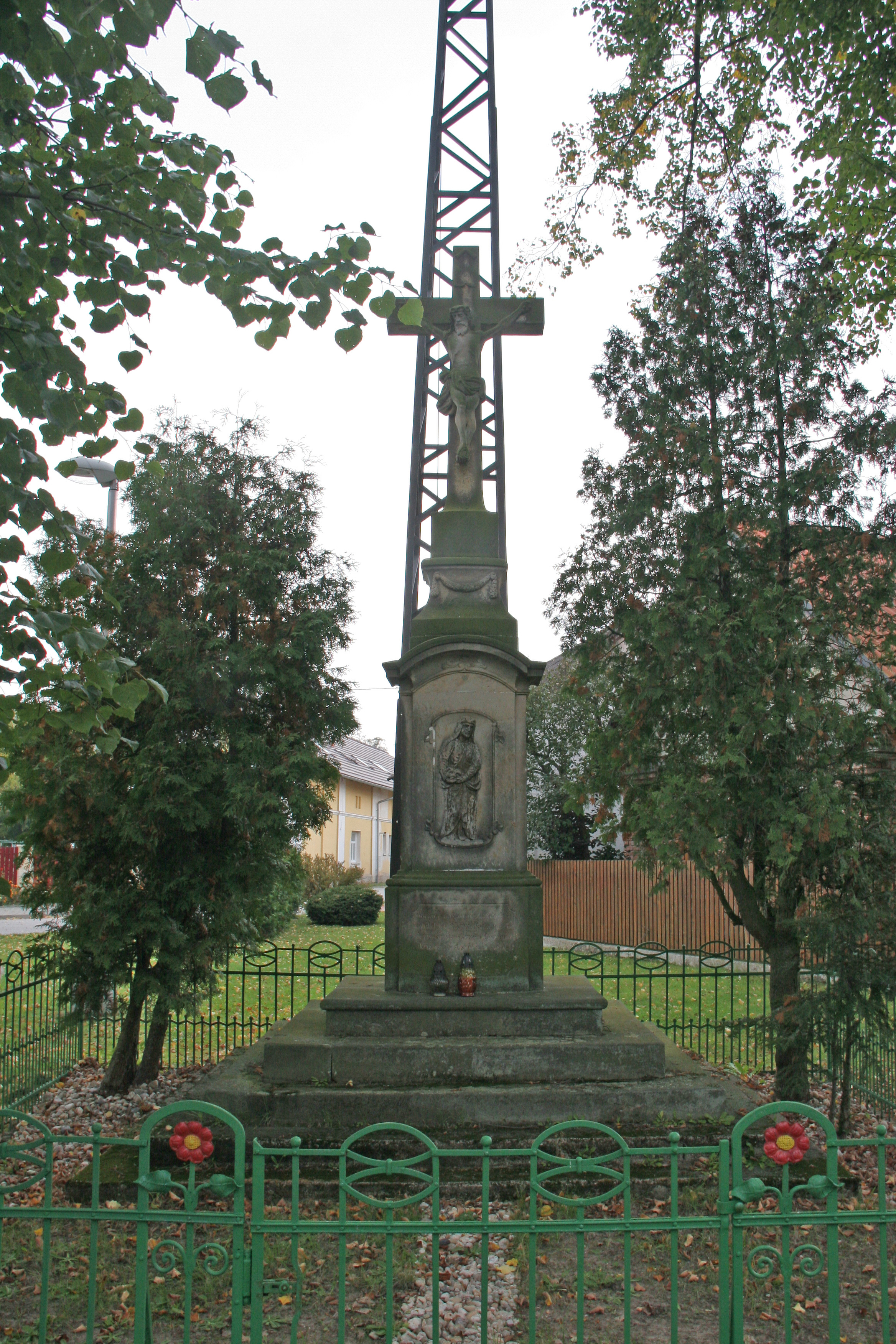 Malšova Lhota kříž